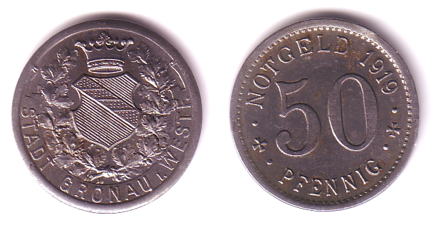 50 Pfennig Notmünze der Stadt Gronau in Westfalen 1919 mit altem Wappen 1894-1937